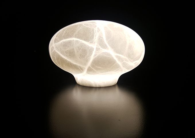 アラバスターランプ